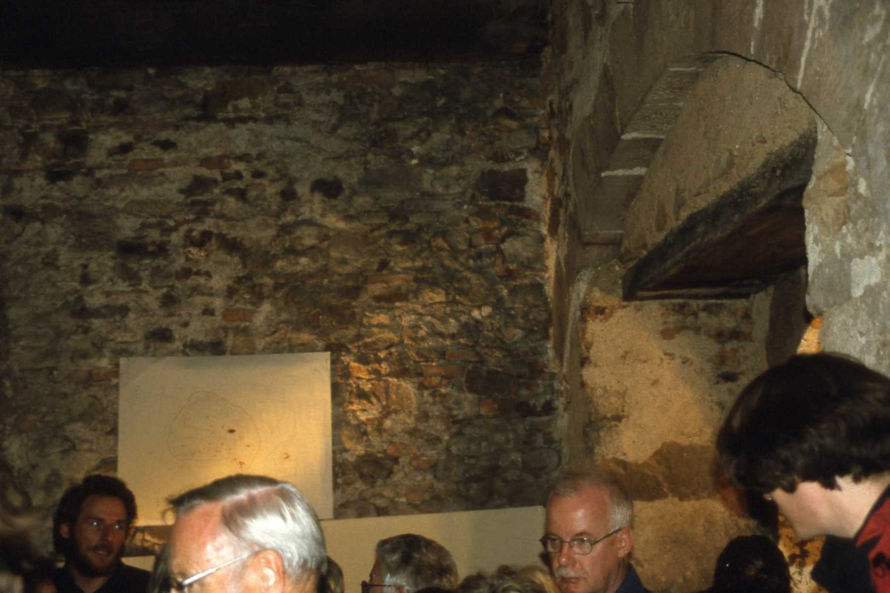 Führung im mittelalterlichen Keller des historischen Gasthauses zum roten Bären in Freiburg am Breisgau am Tag des offenen Denkmals, 21. September 2003. Dem hochverdienten Flominator sei dieses Foto gewidmet.